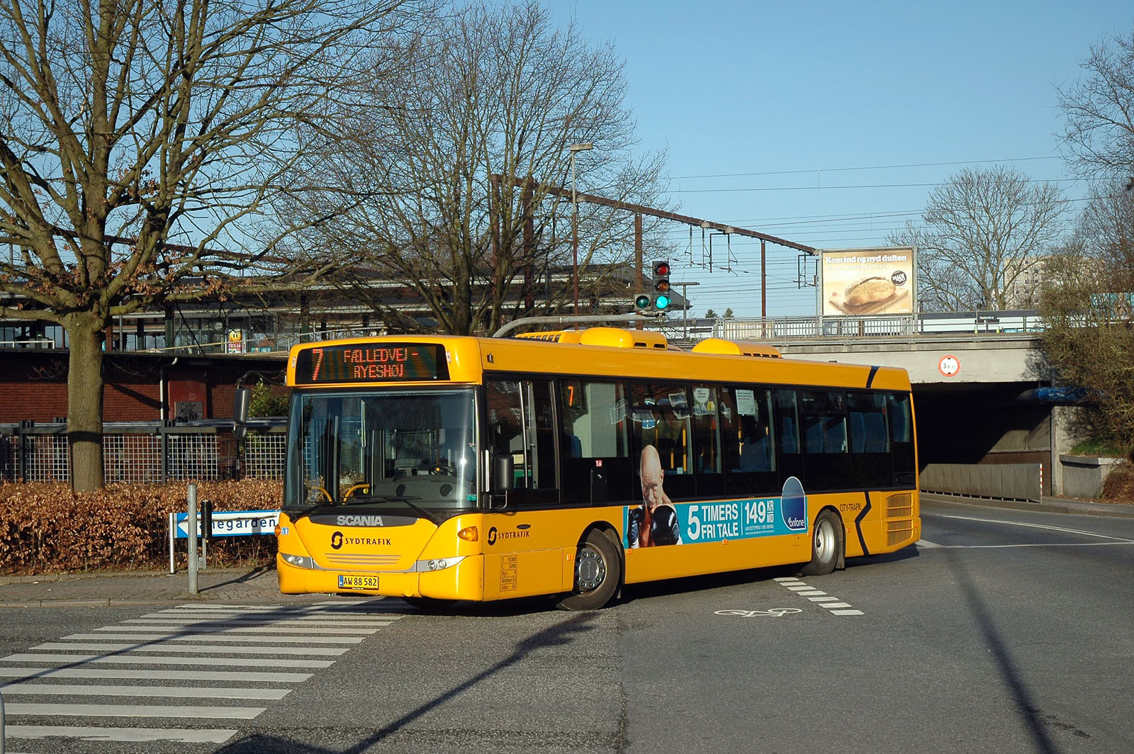 City-Trafik bus 152 på hjørnet af Vejlevej og Jernbanegade i Fredericia